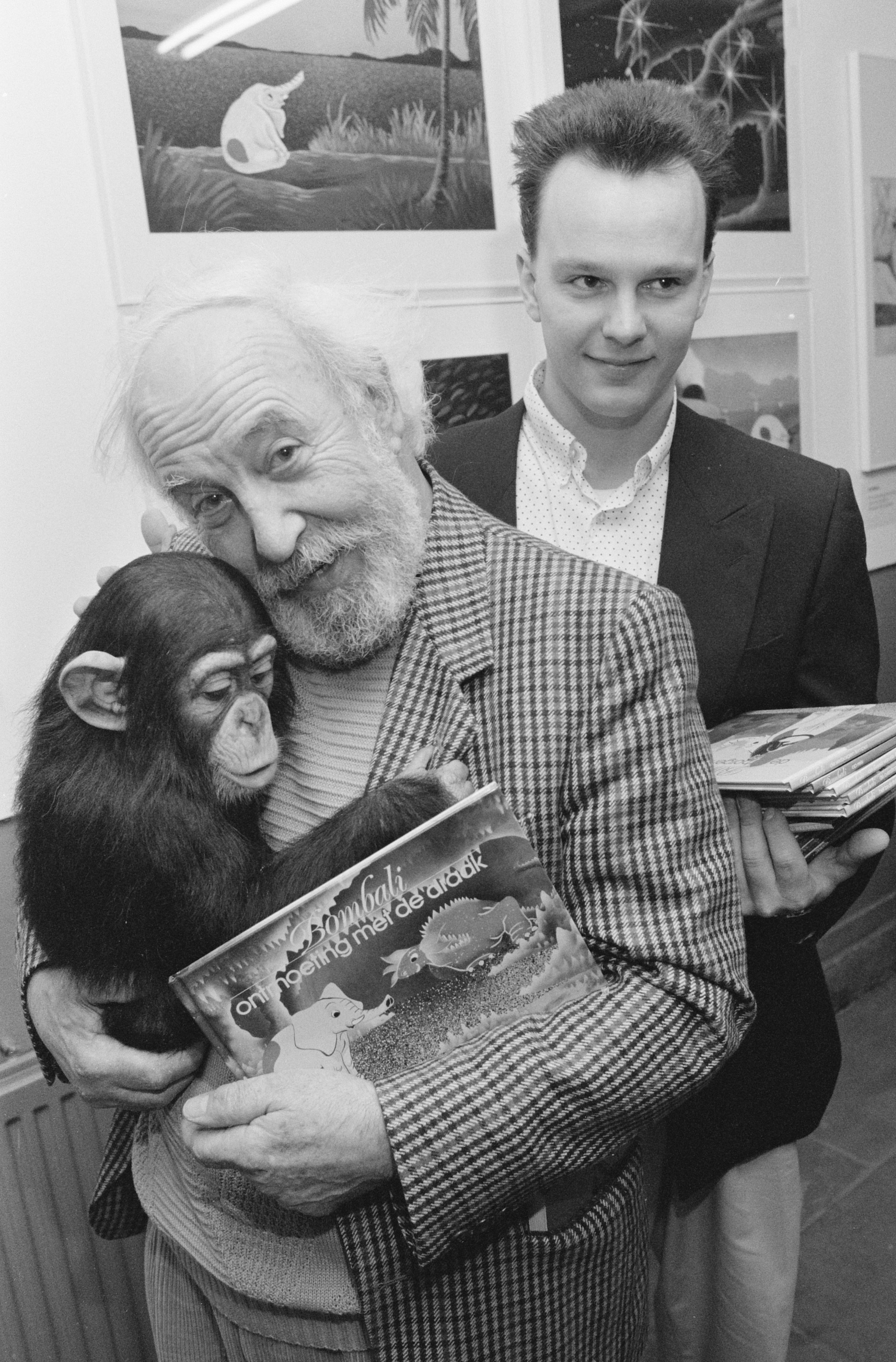 Acteur Lex Goudsmit presenteert zijn kinderboekenserie Bombali, geïllustreerd door zijn zoon Riek